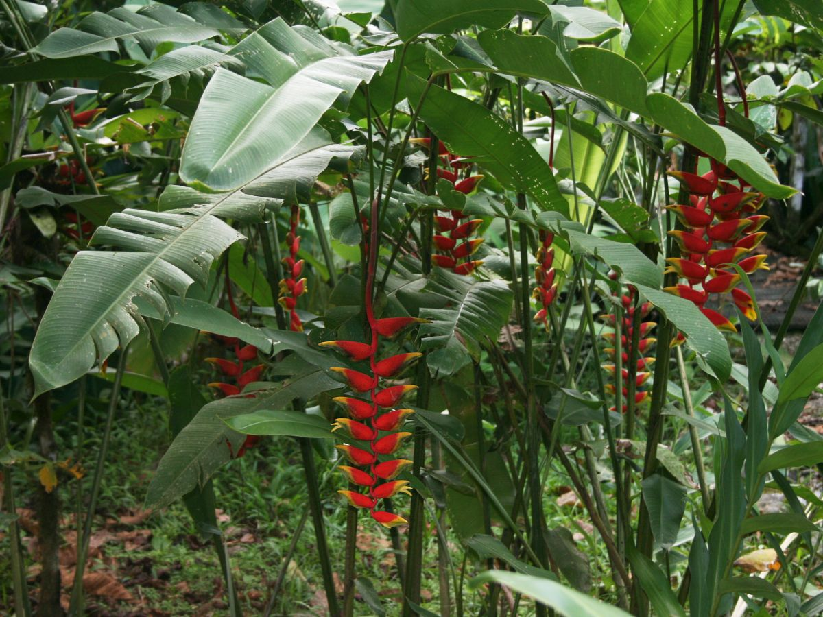 Heliconia rostrata, Heliconiaceae - Costa Rica: Prov. Puntarenas, La Gamba NW Golfito, "Tropenstation La Gamba"/"Estación Biológica La Gamba"